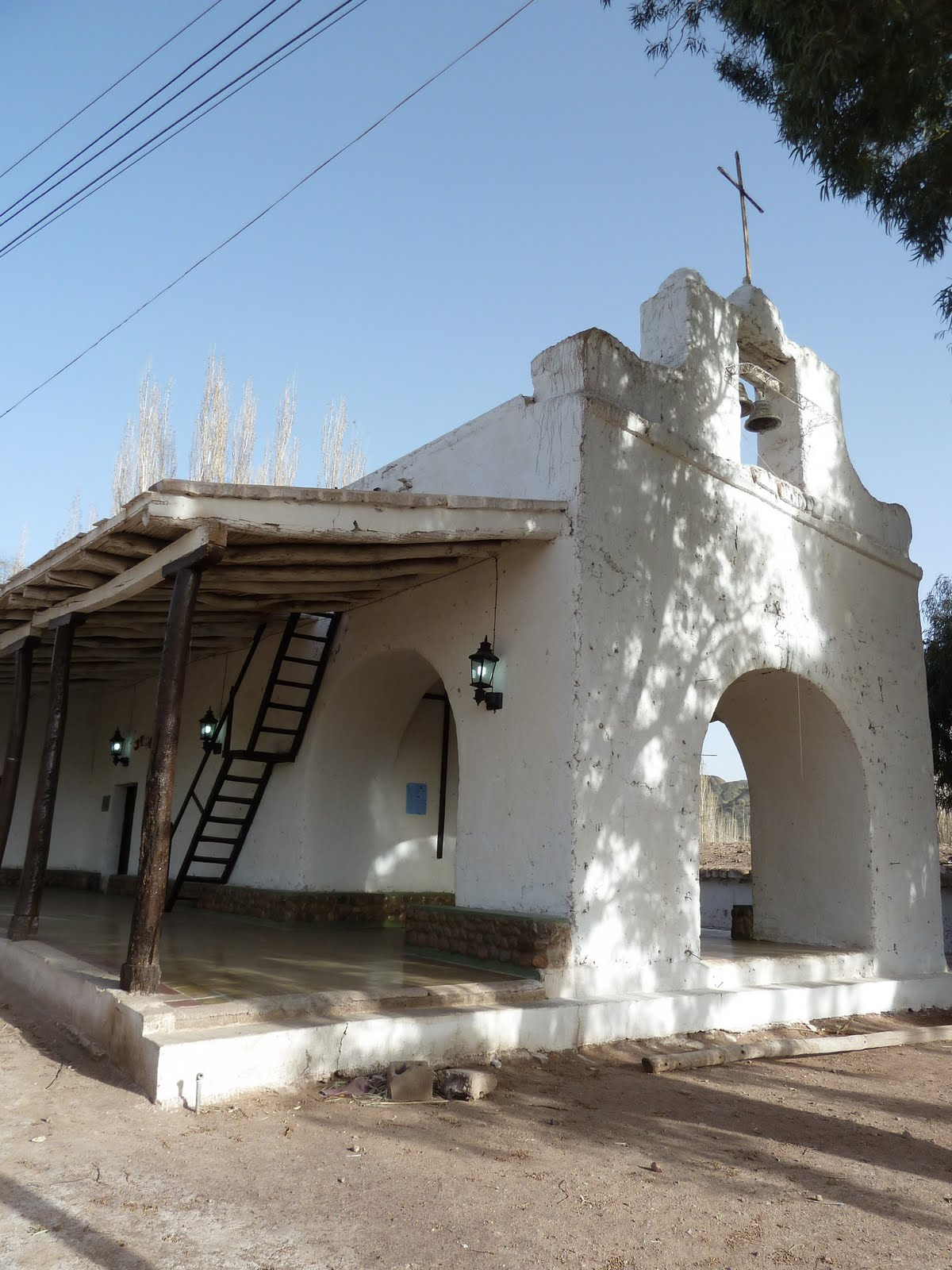 Capilla Nuestra Señora del Carmen, ubicada en la localidad de Calingasta, provincia de San Juan, Argentina.